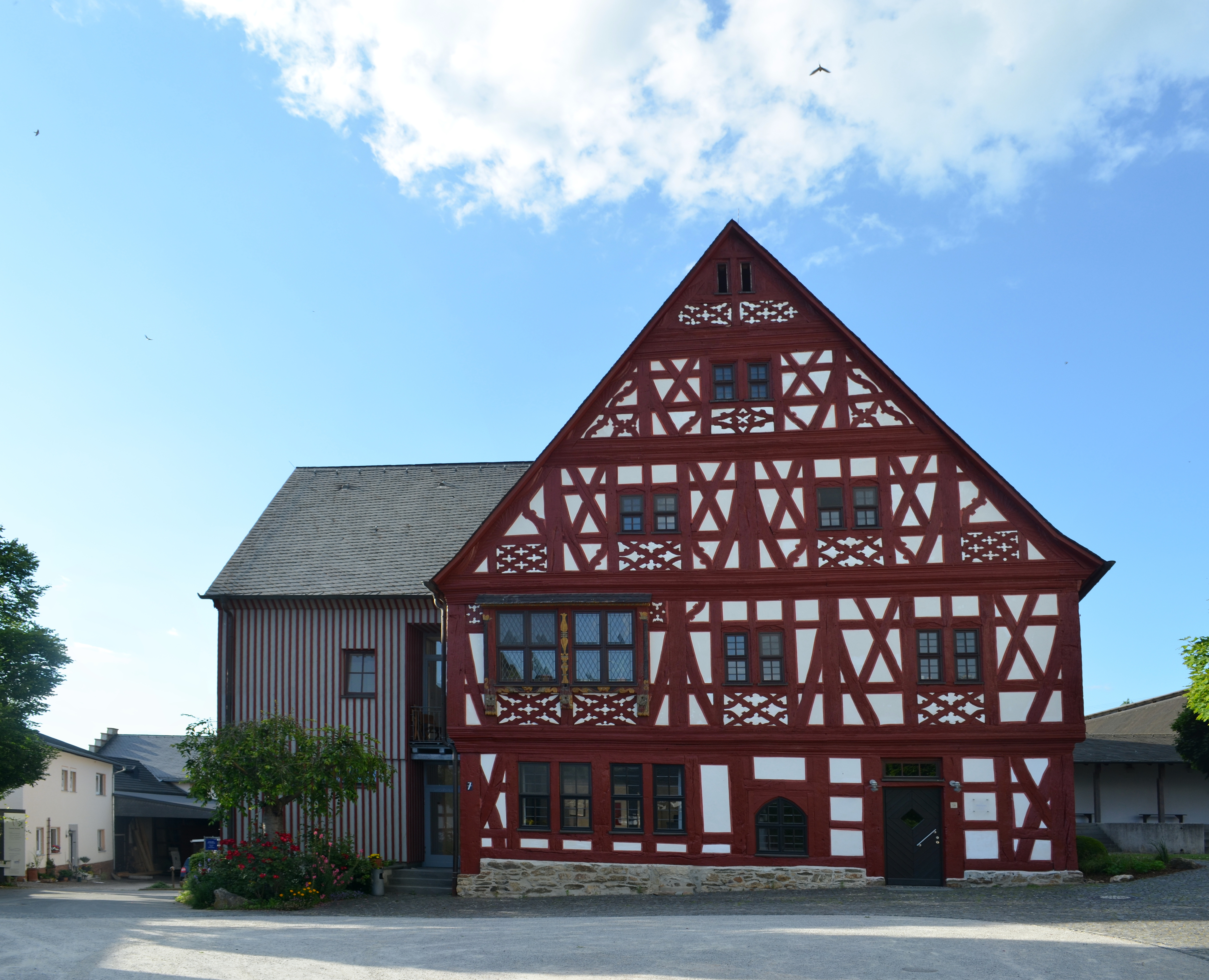 Kloster Gnadenthal, ehemaliges Äbtissinenhaus